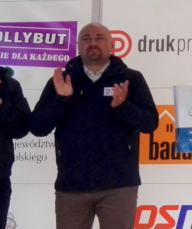 Prudnik, VI Memoriał im. Stanisława Szozdy